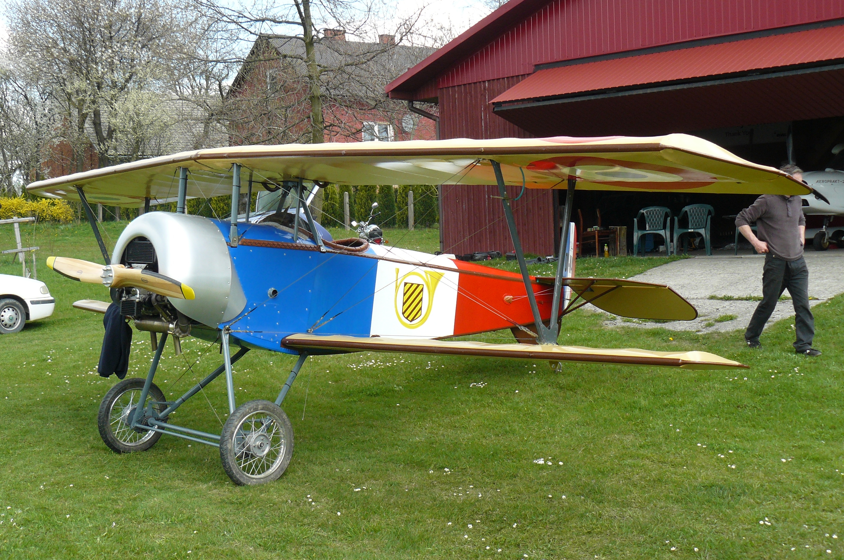 Nieuport 11,replika samolotu , 7/8 skali , ultralight ,zbudowany w Starej Wsi k/Krosna, właściciel Krzysztof Cwynar